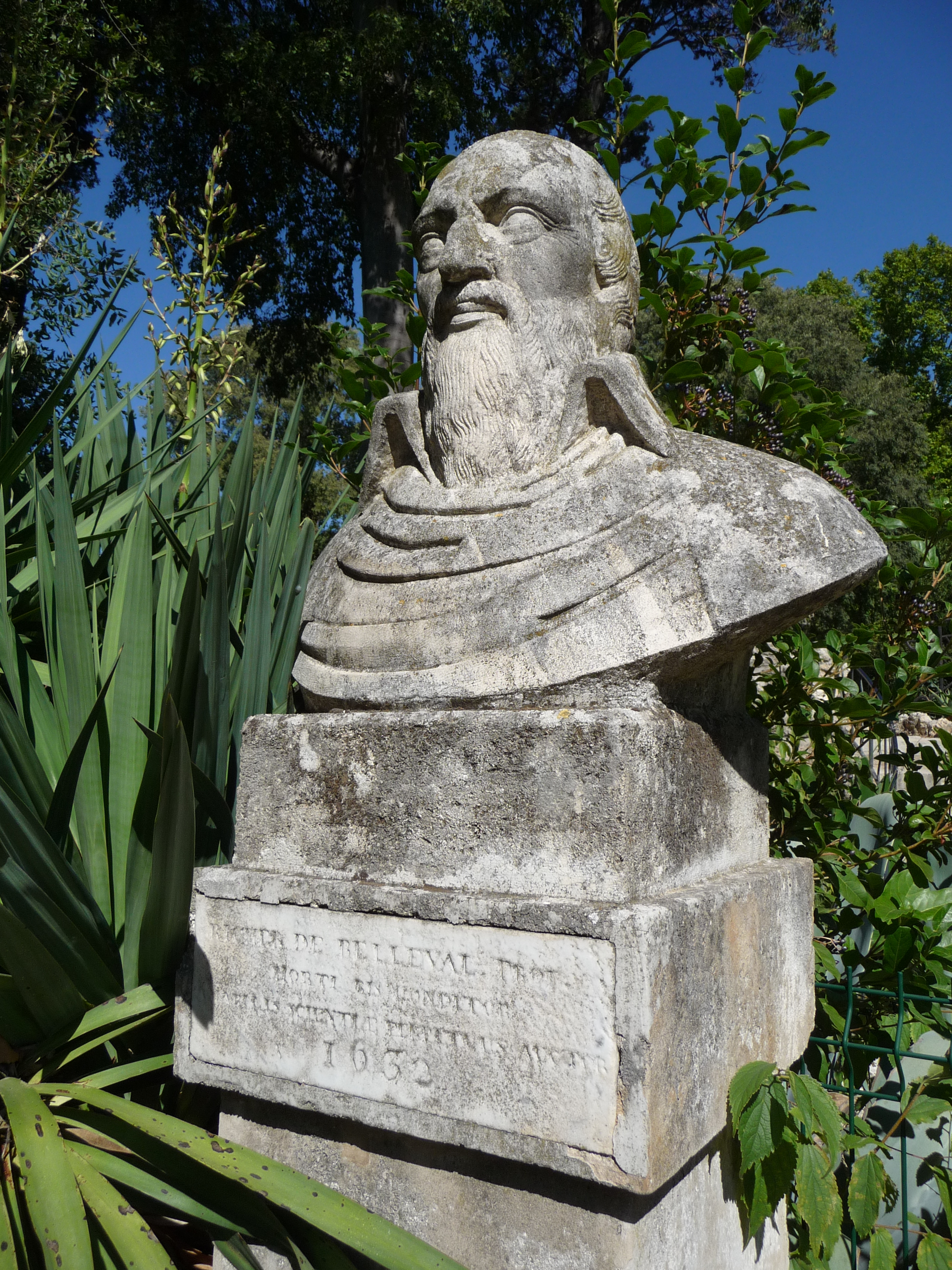 Bust de Pierre Richer de Belleval al Jardí Botànic de Montpeller .